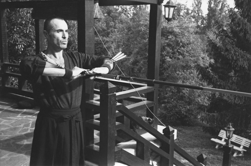 L’usage du « PHI » de l'école du souffle "Sarbacana" est un procédé impliquant un tout autre protocole de lecture que les modes habituels de visée. Le principe étant de mettre en synergie consciente des stimulus captés par des systèmes sensoriels différents. Placer les sensations kinesthésiques en résonances synesthésiques avec la perception visuelle.